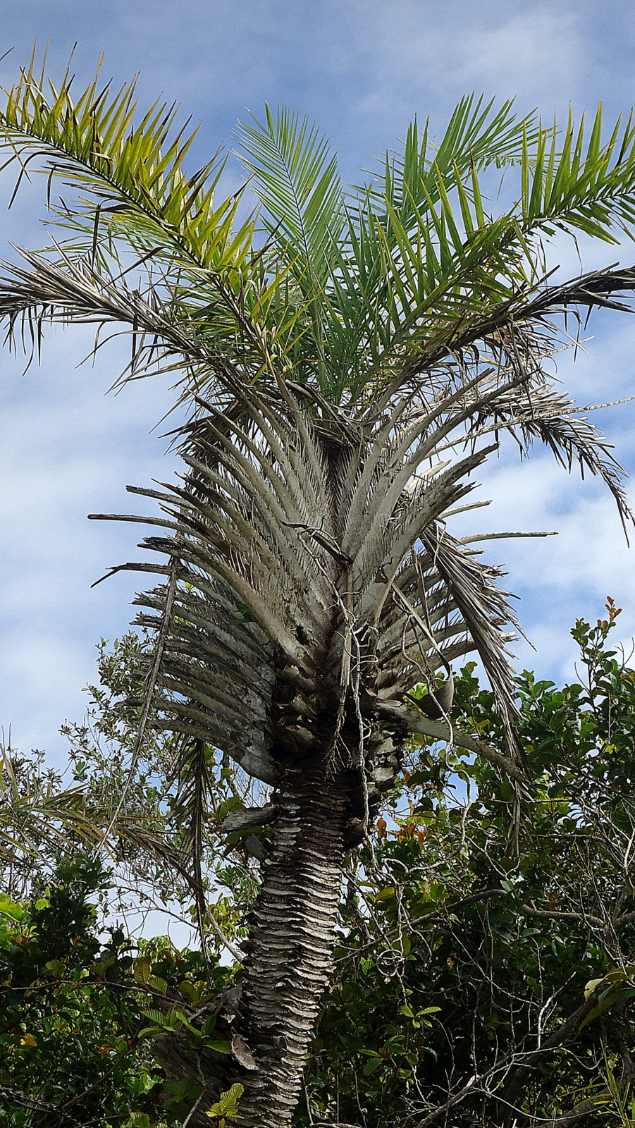 Syagrus coronata (Mart.) Becc.